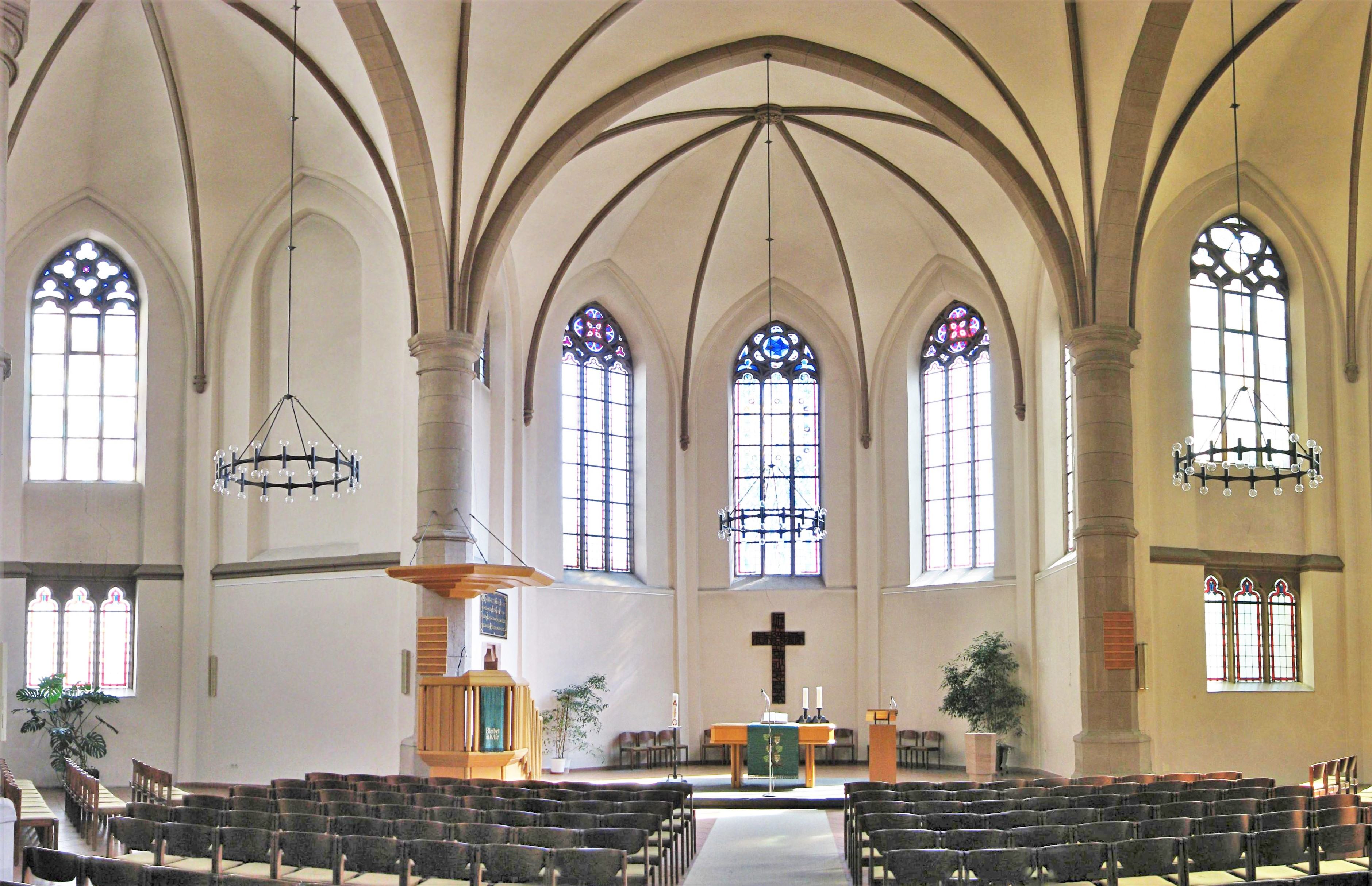 Evangelisches Gemeindezentrum, Christuskirche in Neunkirchen. Die Christuskirche war eine Stiftung von Carl Ferdinand von Stumm-Halberg an die evangelische Gemeinde und ist auf dem Wappen der Stadt abgebildet